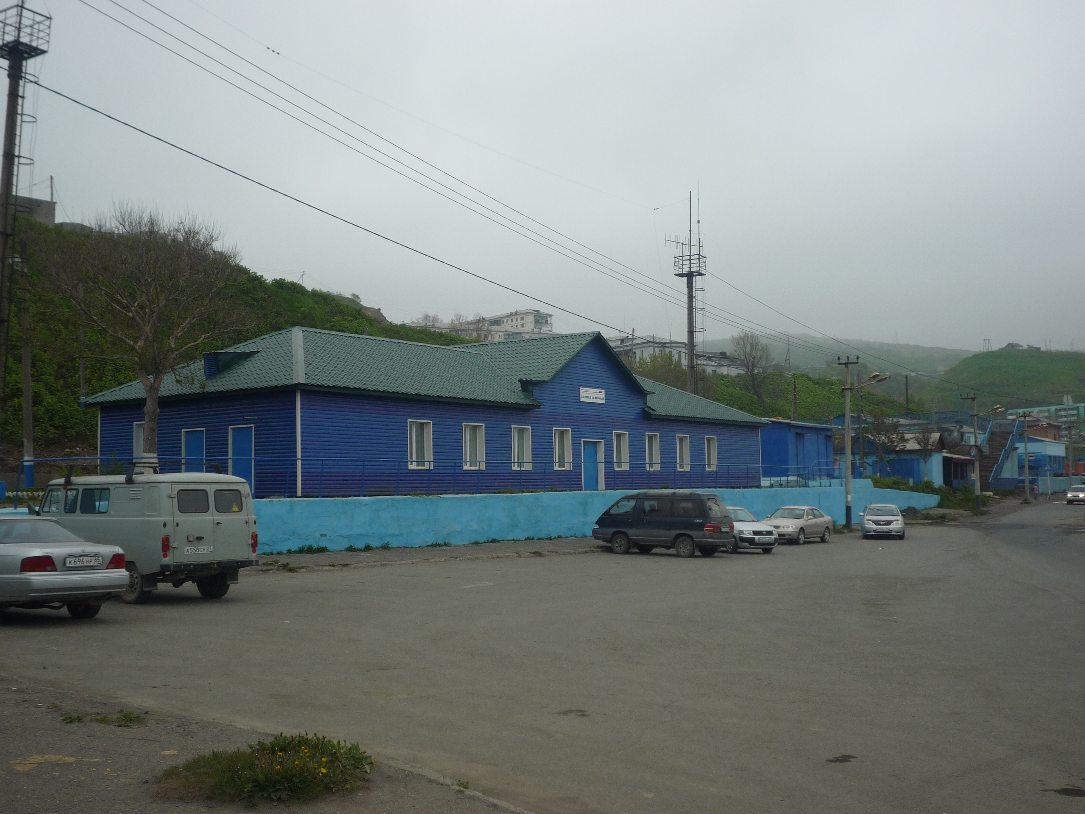 Северный вокзал Холмска (2012)